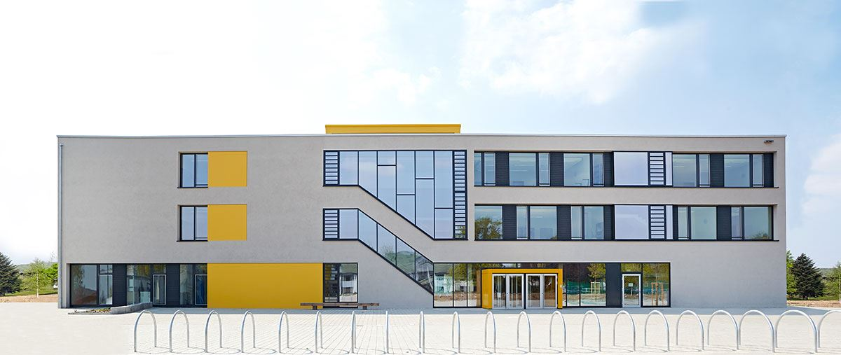 FES Lahr